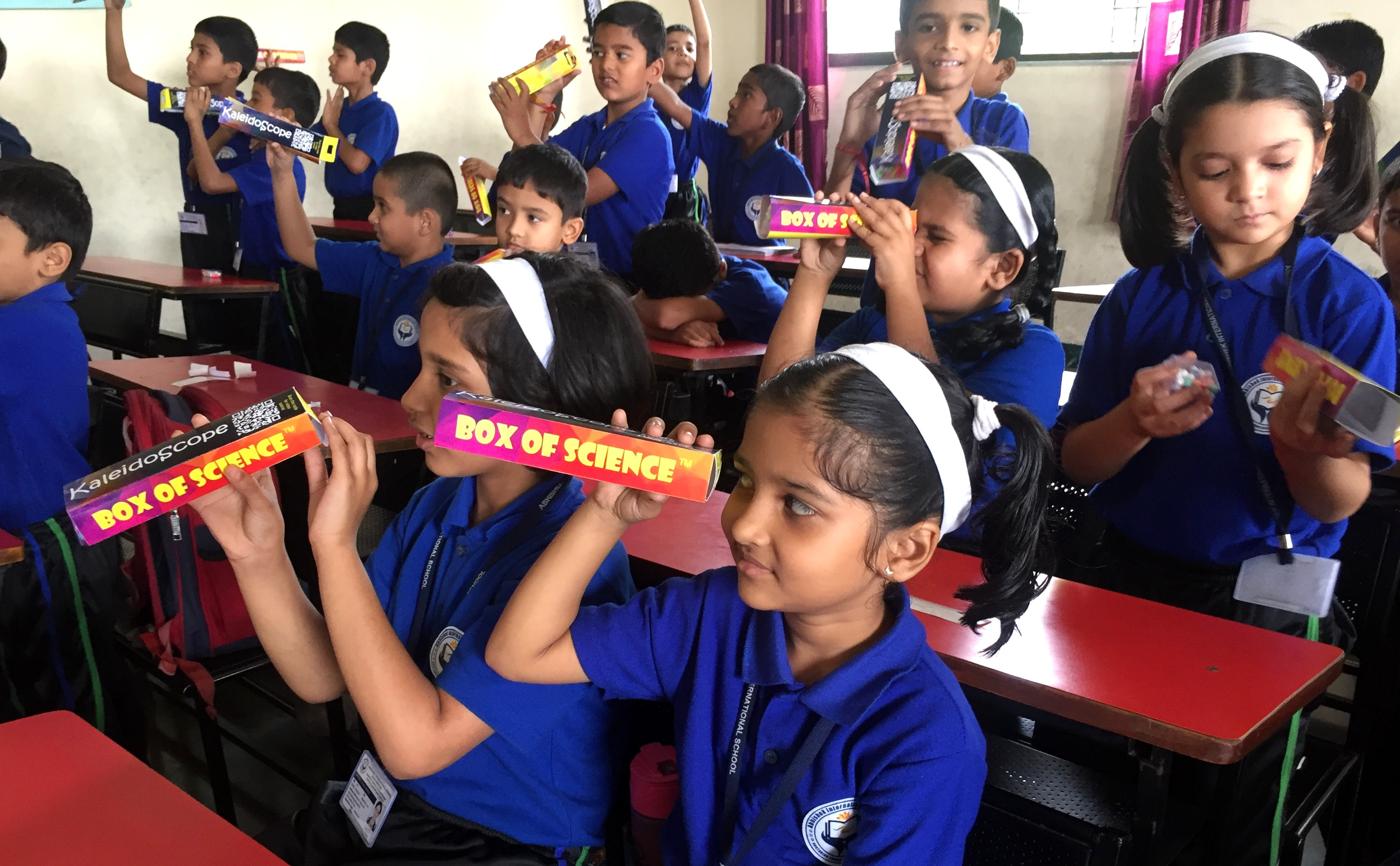 'बॉक्स ऑफ सायन्स' तर्फे राबविल्या जाणाऱ्या कार्यशाळा